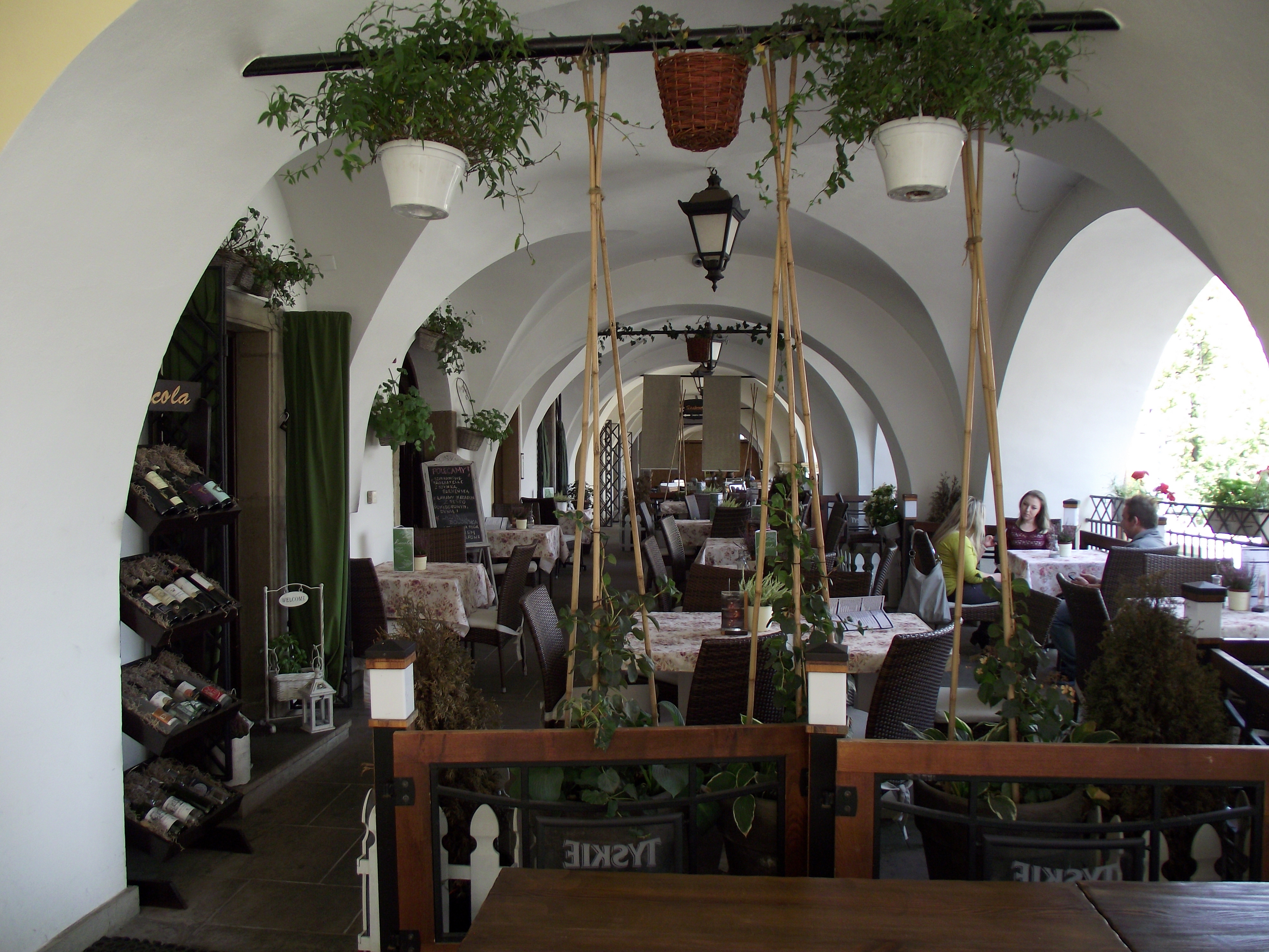 Bílsko-Bělá, Staré Město, podloubí.